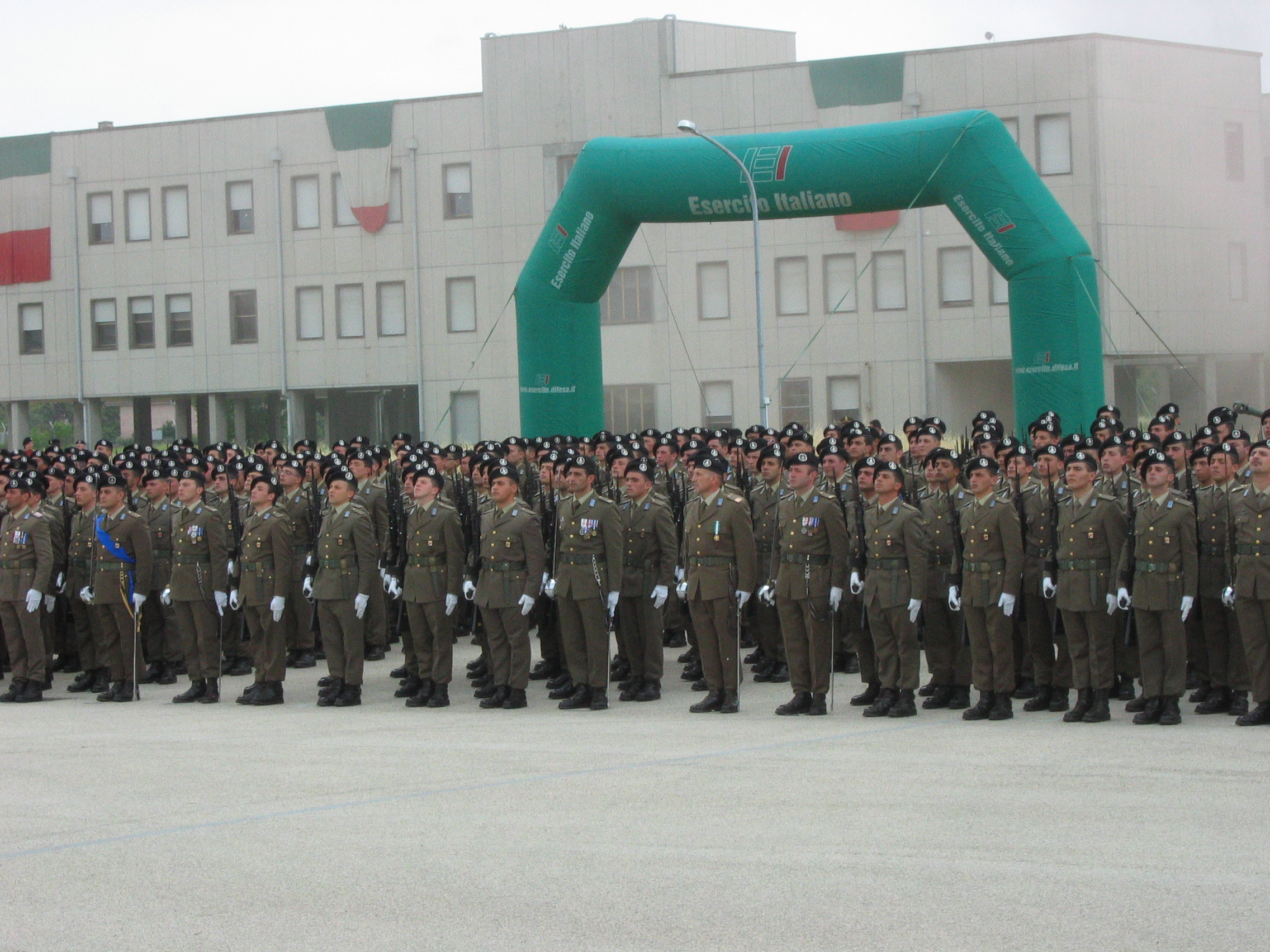 è una foto scattata da me durante un giuramento.